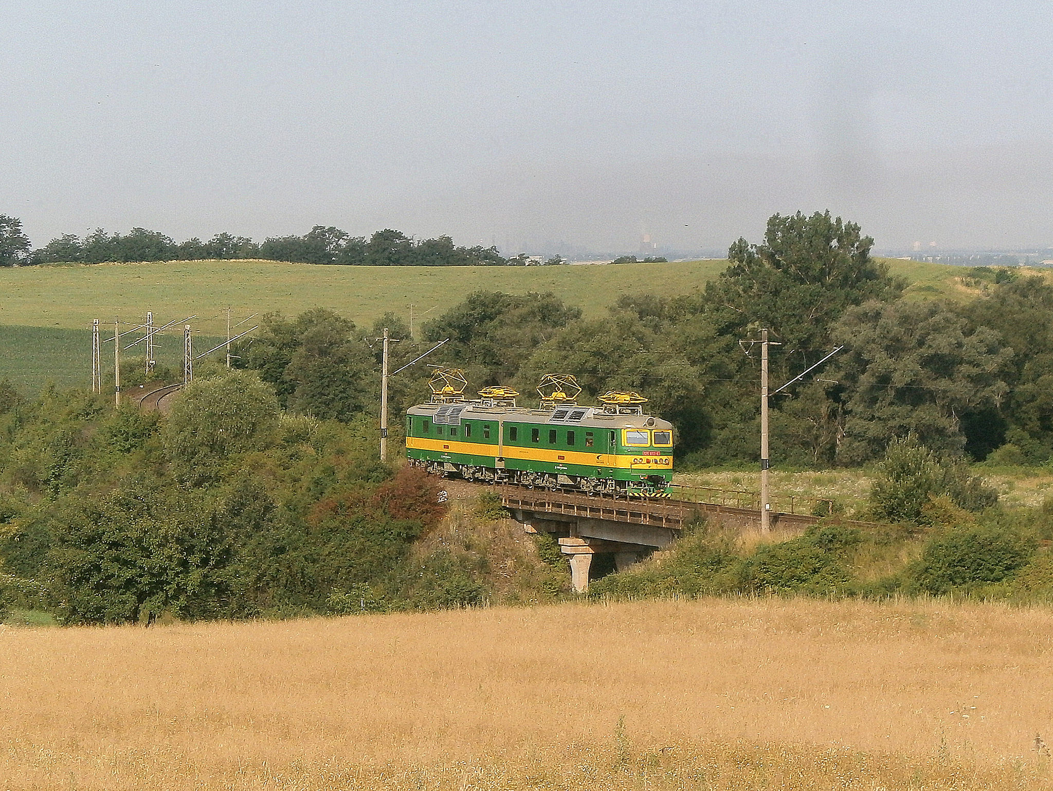 HKV 125.813/814